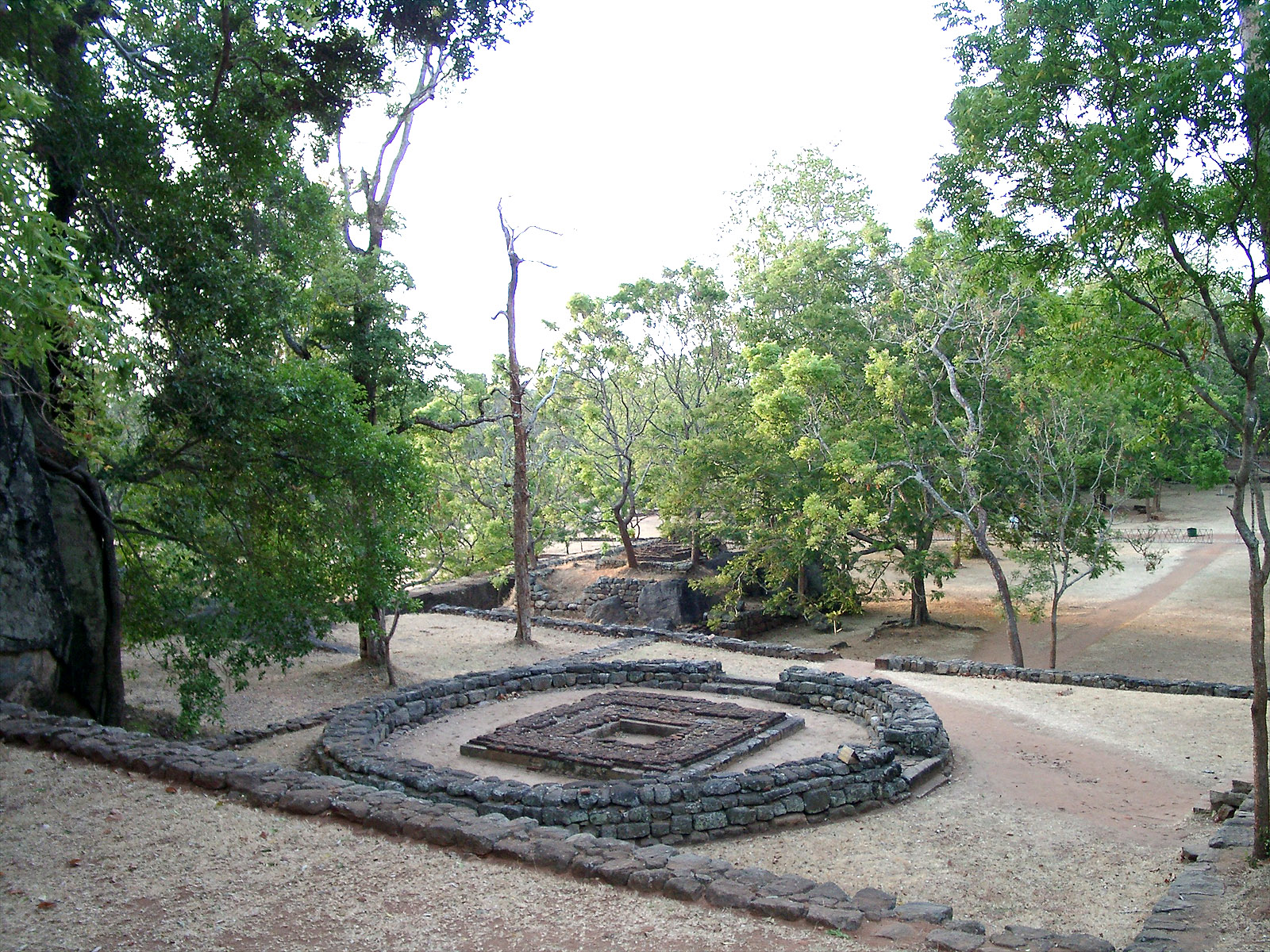 Garden in Sigiriya in Sri Lanka